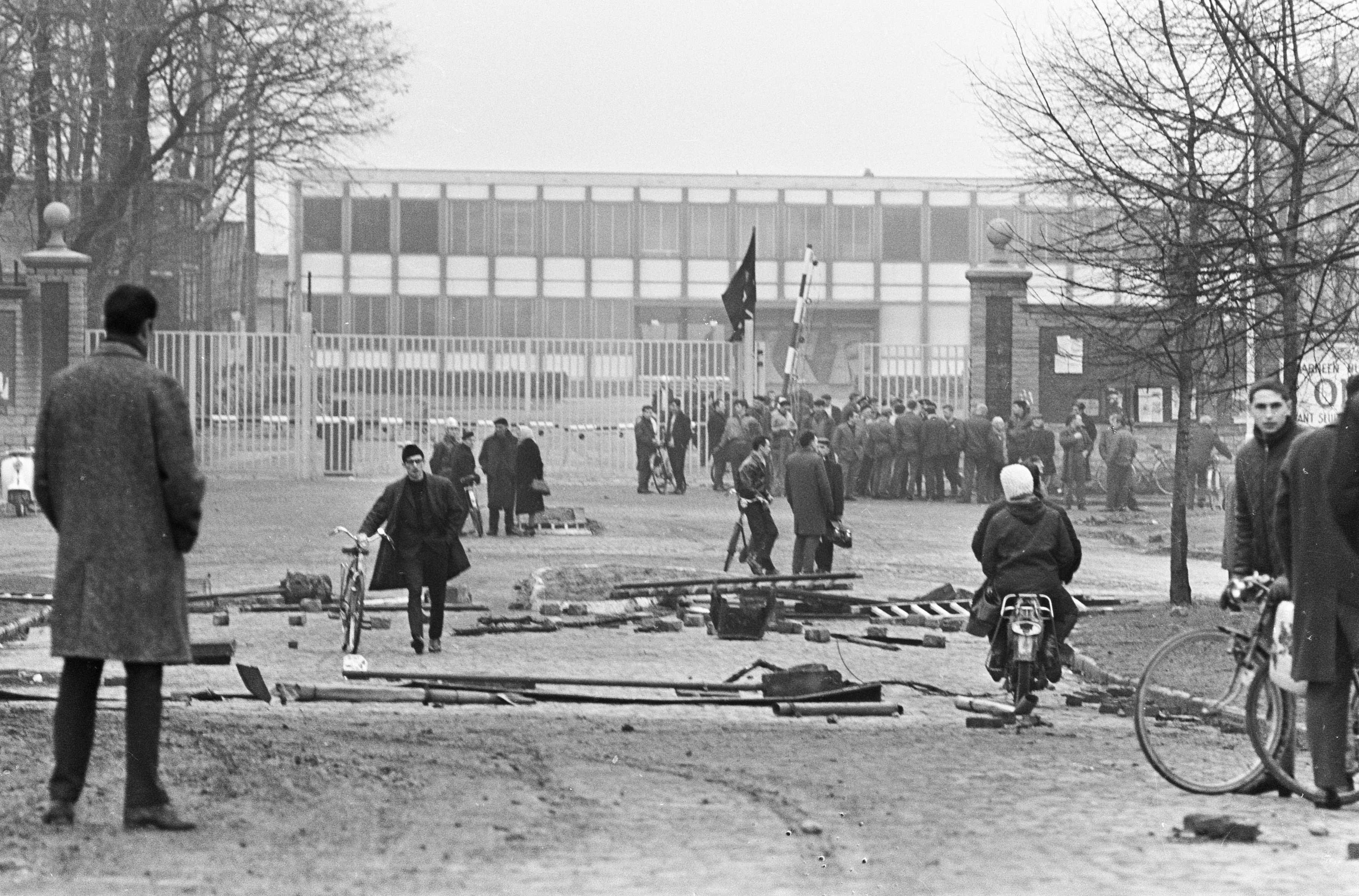 Collectie / Archief : Fotocollectie Anefo Reportage / Serie : [ onbekend ] Beschrijving : De Belgische onlusten, ingang mijn Zwartberg, de straten zijn opgebroken Datum : 2 februari 1966 Trefwoorden : STRATEN, ingangen Persoonsnaam : Zwartberg Fotograaf : Koch, Eric / Anefo Auteursrechthebbende : Nationaal Archief Materiaalsoort : Negatief (zwart/wit) Nummer archiefinventaris : bekijk toegang 2.24.01.05 Bestanddeelnummer : 918-7397